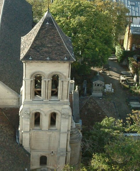 Eglise Saint-Pierre de Montmartre et cimetière du calvaire